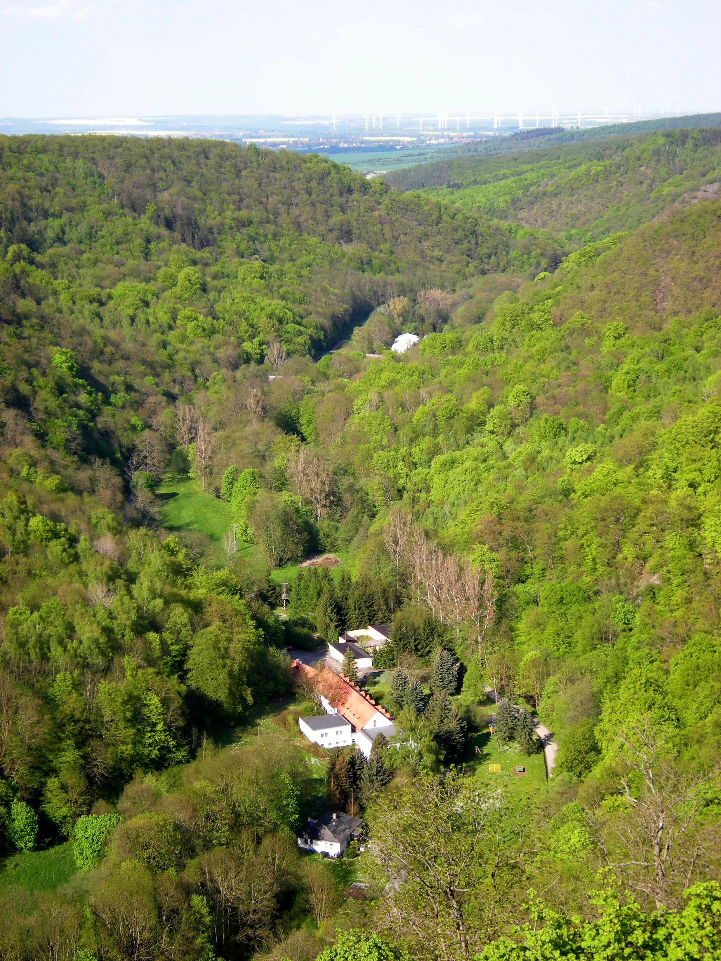 Burg Falkenstein über dem Selketal Aussicht.jpg